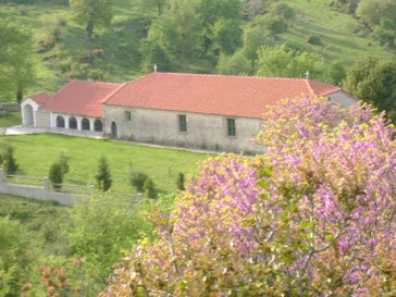 ΠΑΛΑΙΑ ΚΑΤΩ ΚΕΡΔΥΛΛΙΑ